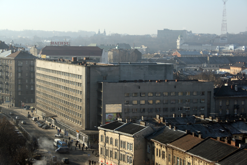 Hotel Lviv